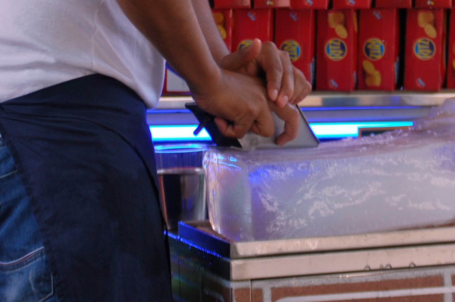 Ghiaccio grattato con un raschietto per ottenere la grattachecca, tipico gelato delle serate romane – Italia.